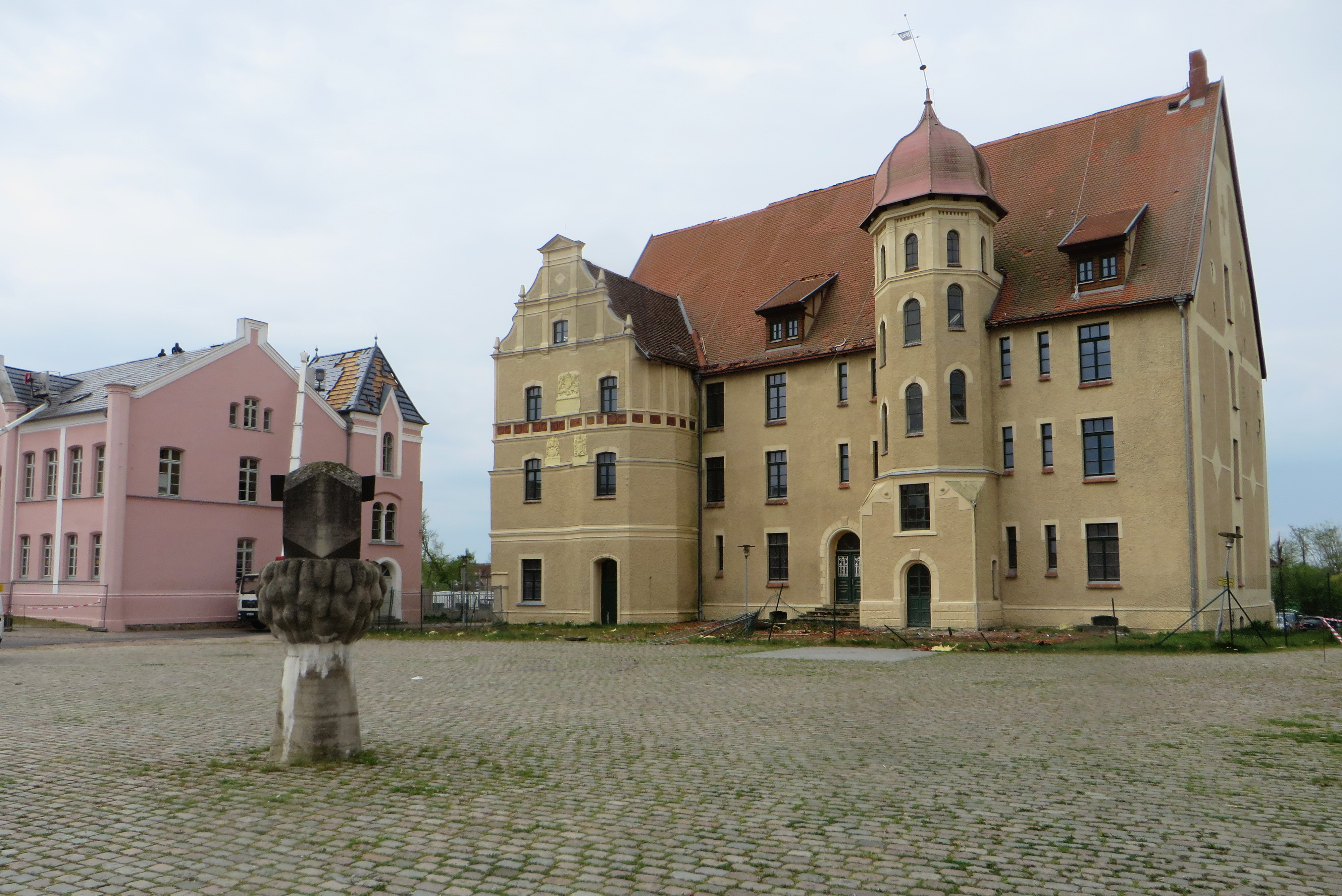 Das Schloss Bützow vier Tage nach dem Tornado.